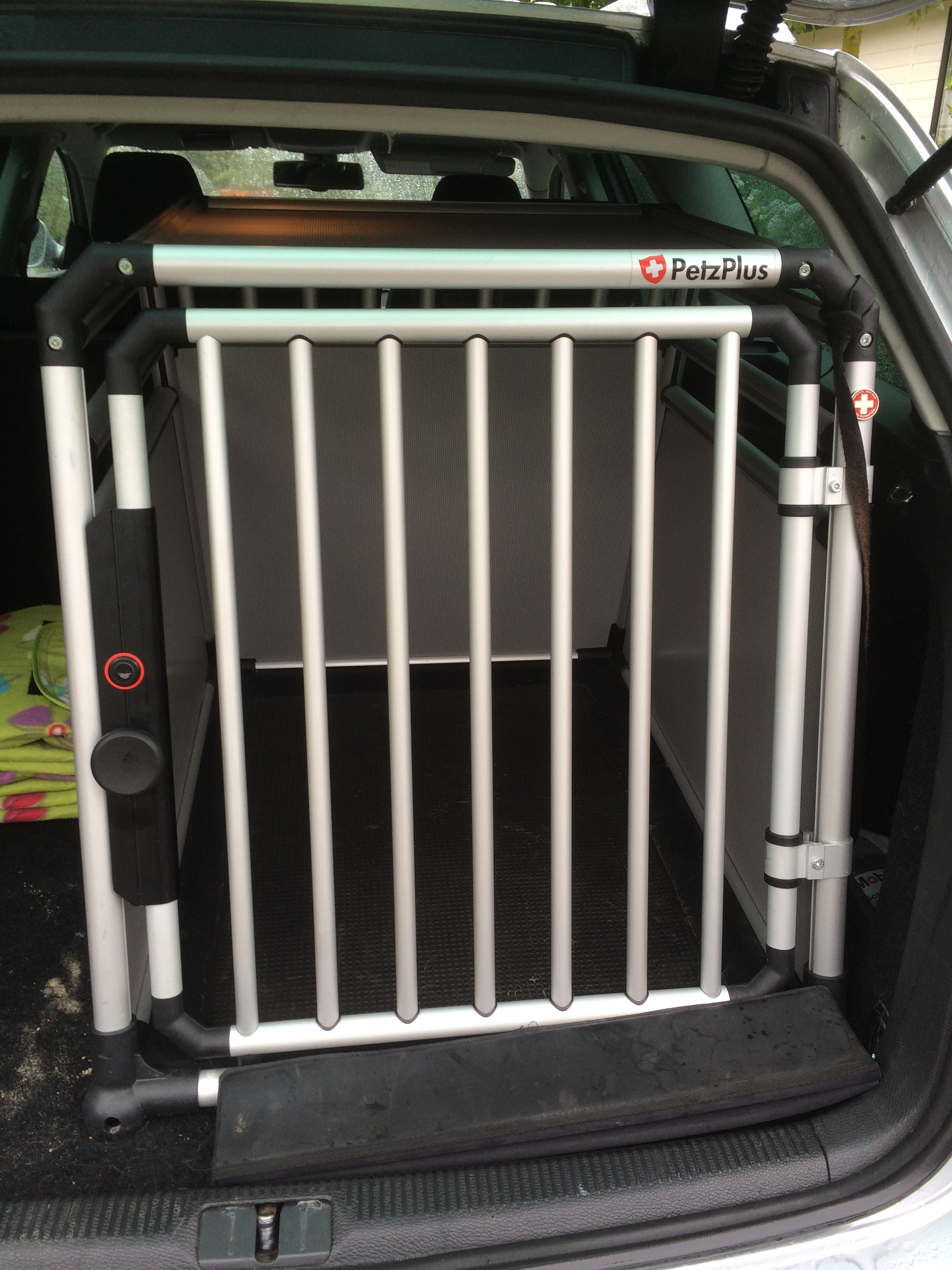 Hundebox